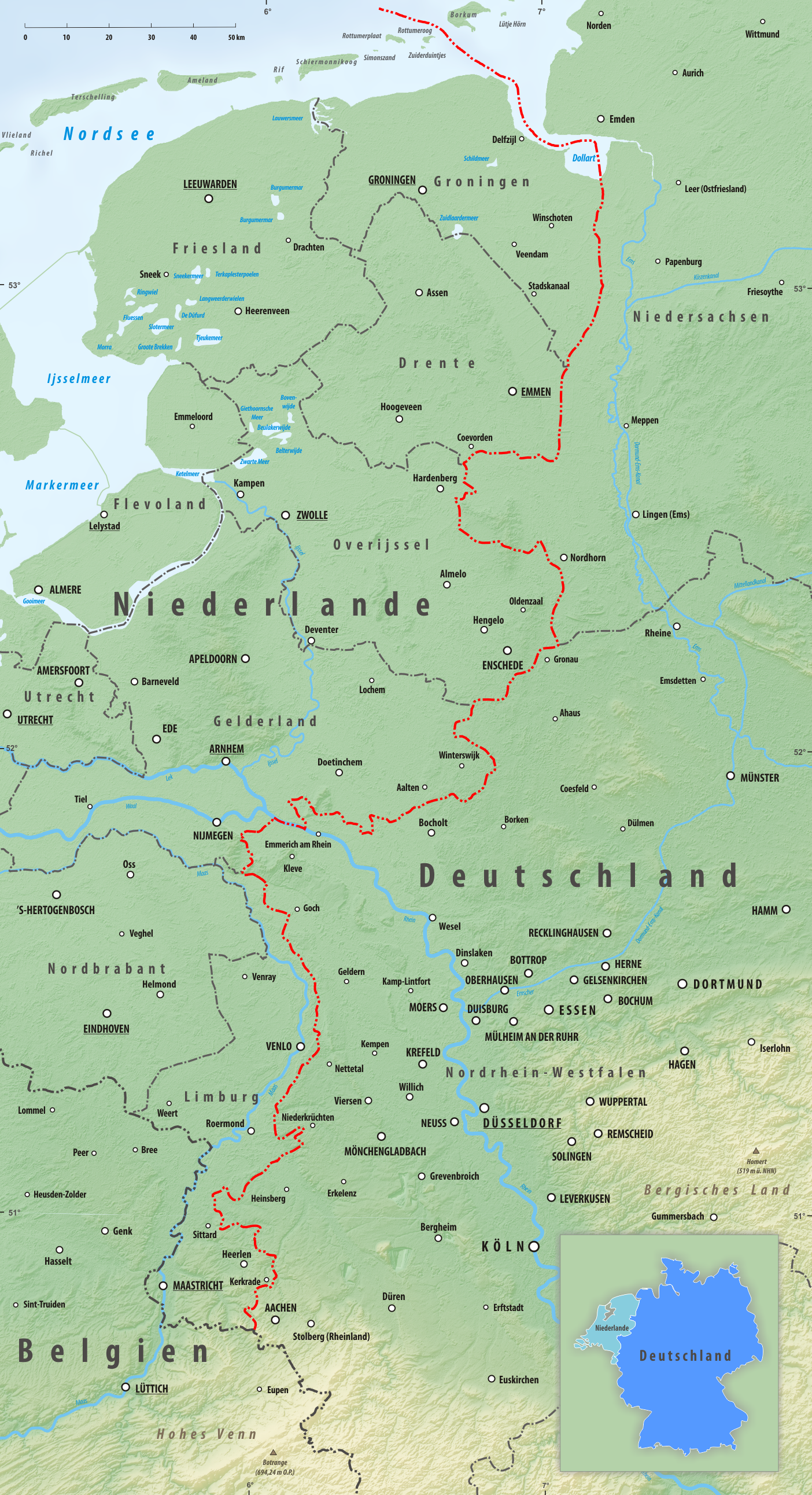 Reliefkarte des Grenzverlaufes zwischen Deutschland und der Niederlande Topographischer Hintergrund: NASA Shuttle Radar Topography Mission (public domain). SRTM3 v.2.